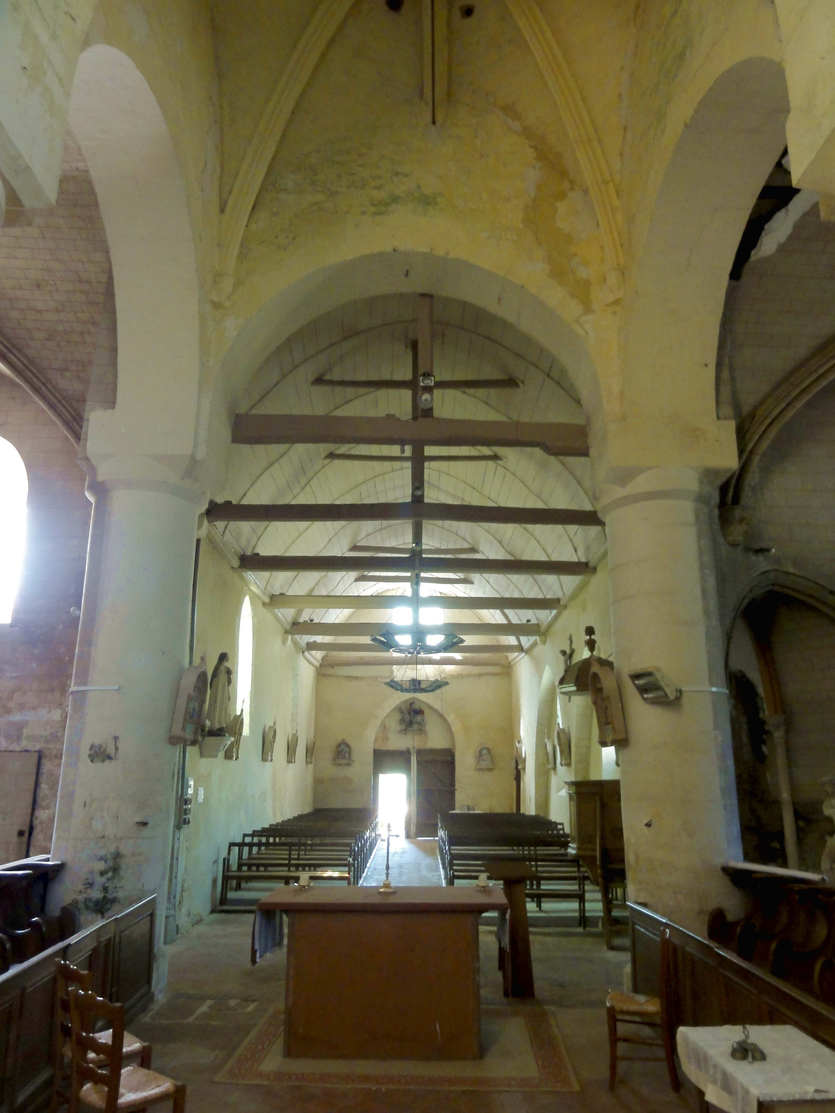 Intérieur de l'église (voir titre).